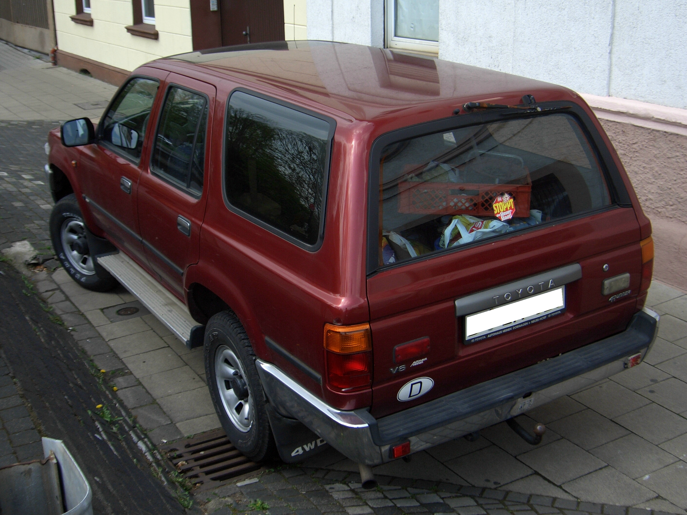 Toyota 4Runner (Europe), Gen2 1990-1995, seen in Duesseldorf, Germany